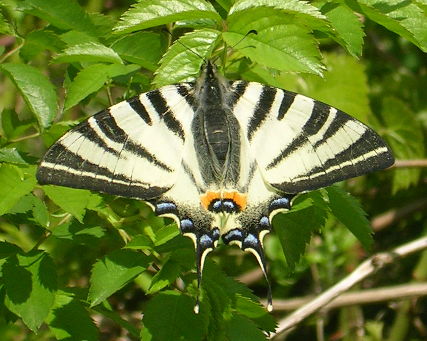 Segelfalter (Iphiclides podalirius)Hackenberg, Wien